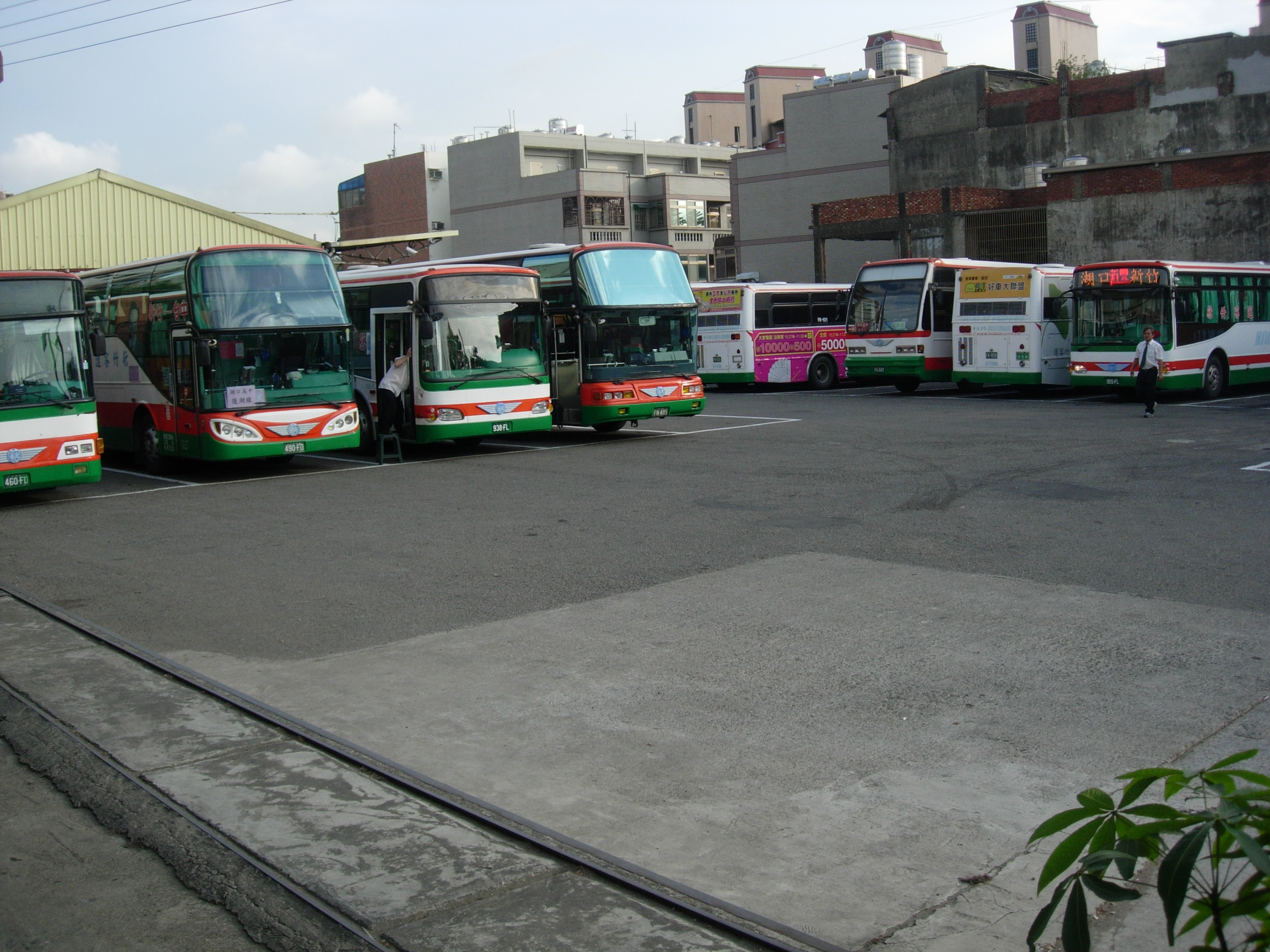 中文（台灣）: 新竹客運湖口站停車場